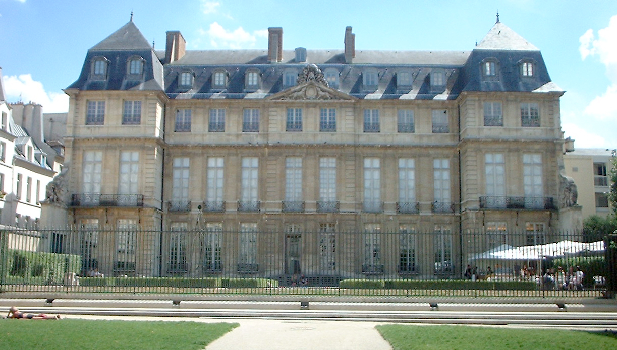 Sujet:De Musée Picasso zu Paräis Source:Eege Foto vum Utilisateur:Pol